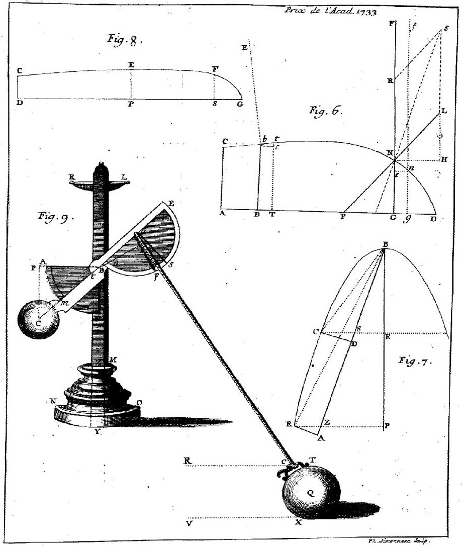 Illustration de Giovanni Poleni, De la meilleure maniere de mesurer sur mer le chemin d'un vaisseau